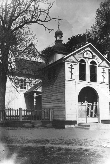 Беларуская (тарашкевіца): Безьдзеж (Bieździež), пляц Рынак (plac Rynak). Царква Сьвятой Тройцы